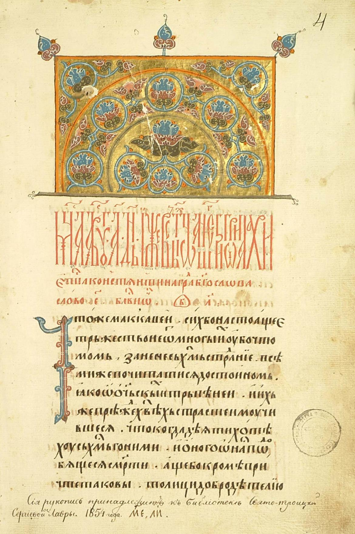 Минея четья мес. август, полууст. крупный, ХVІ века, в лист, 444 л., заглавная заставка с красками и золотом при закладке в рамке. Фонд 304.I. Главное собрание библиотеки Троице-Сергиевой лавры.